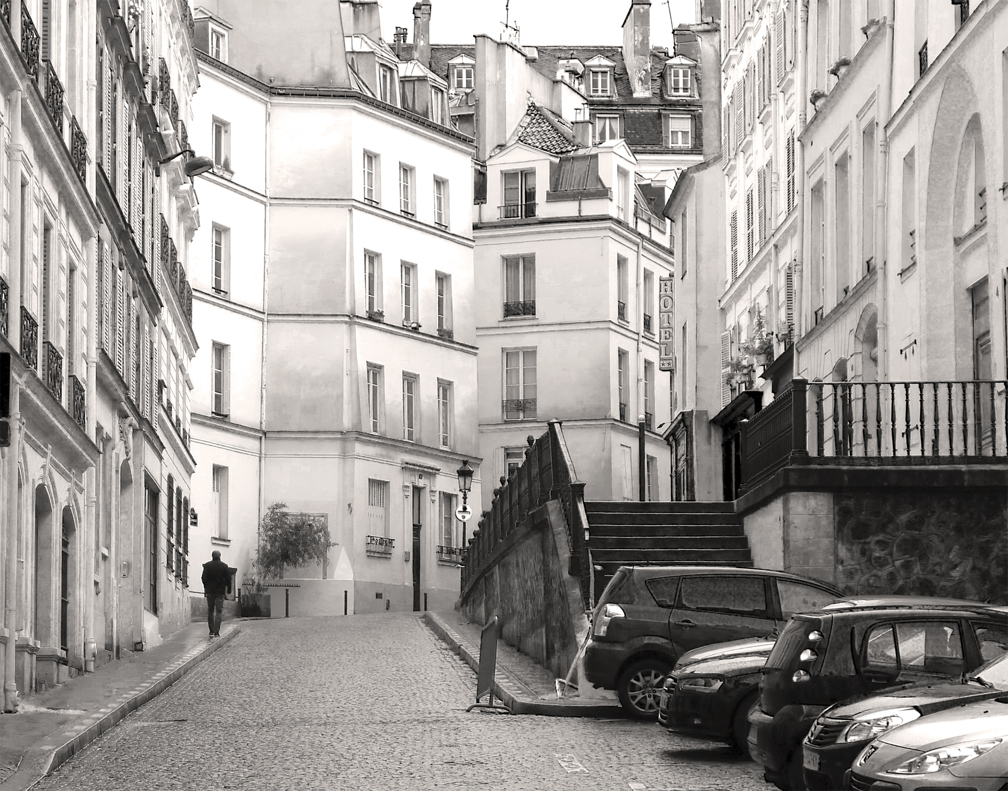 Rue Malebranche - Paris V